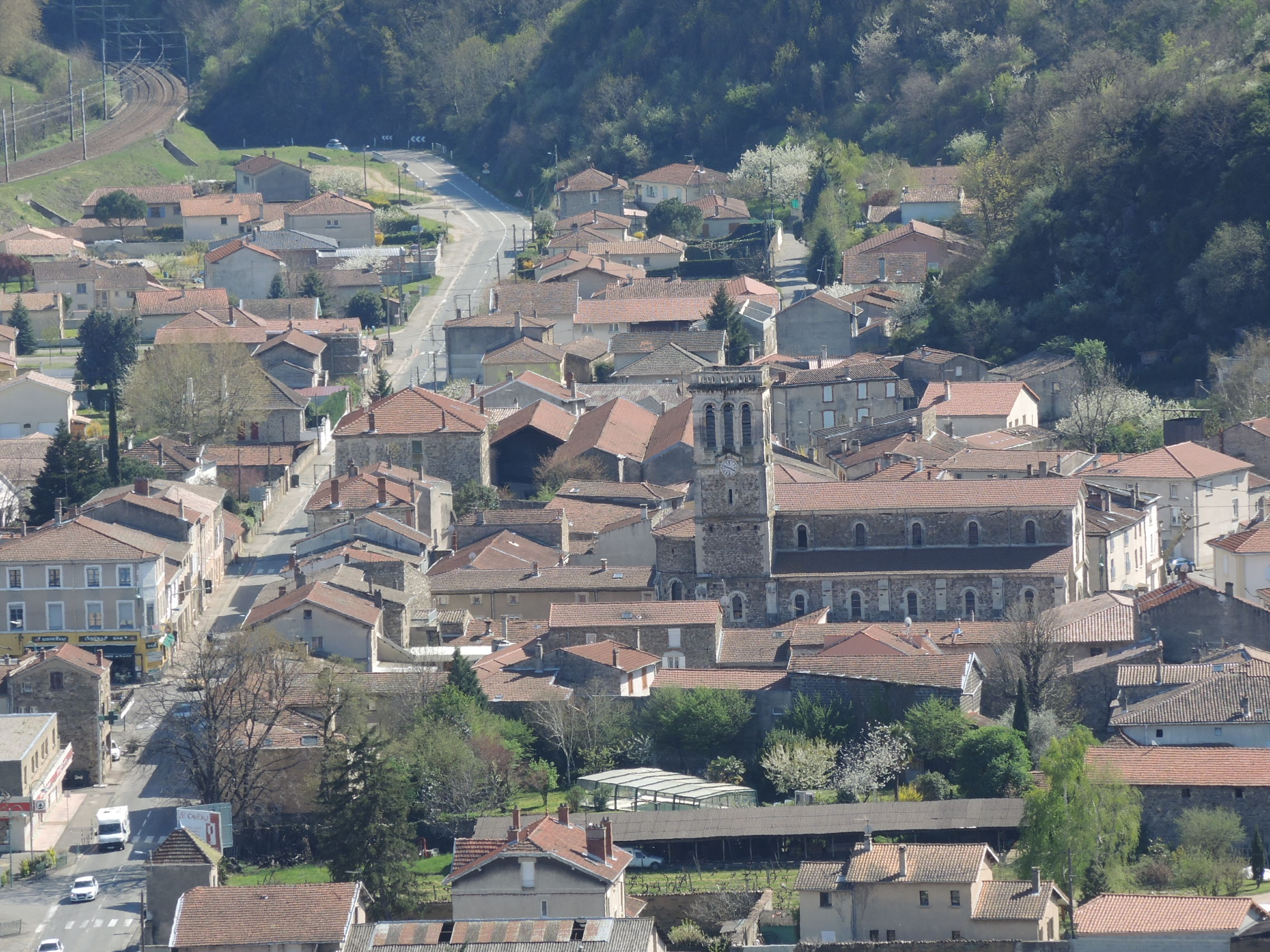 Sarras vue partielle